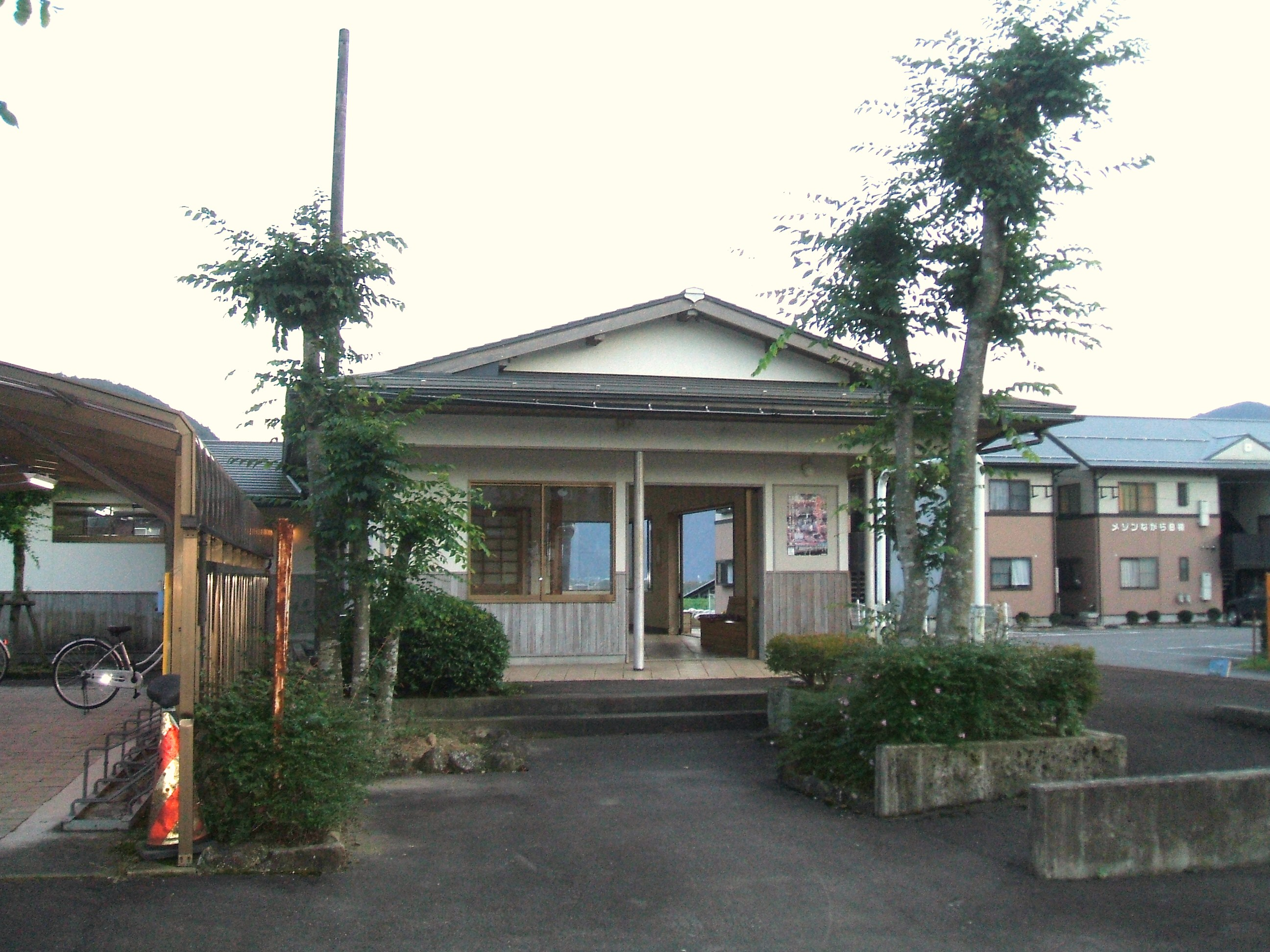 駅舎